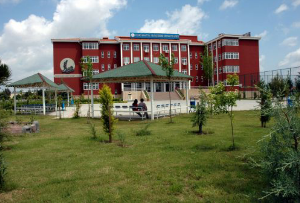 Ceyhan Fen Lisesi